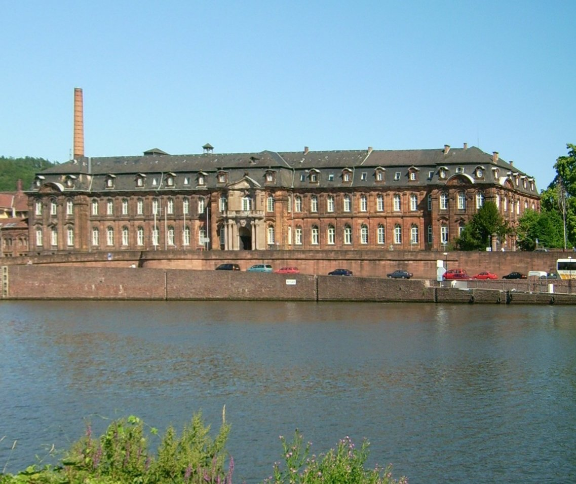 Villeroy & Boch Verwaltungsgebäude